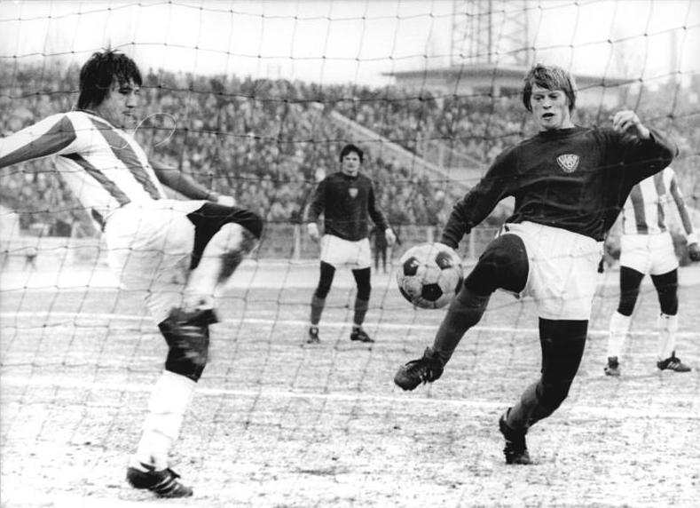 ADN-ZB-Mittelstädt-3.6.76-str-Berlin: Fußball-Oberliga BFC Dynamo-1.FC Magdeburg 4: 0-Eine scharfe Eingabe vor das Tor der Magdeburger Mannschaft kann Wolfgang Steinbach (Magdeburg-l.) noch knapp vor dem Besten Berliner, Nationalspieler Jürgen Riediger, aus dem Torraum schlagen.22 000 Zuschauer sahen am 6.3. im Berliner Jahn-Sportpark einen klaren Erfolg der gastgebenden Dynamo-Elf.